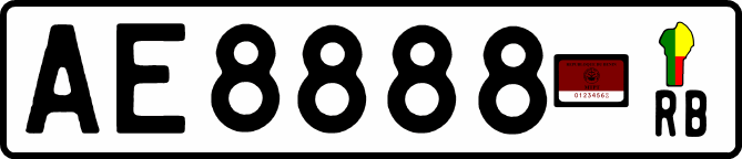 Схематичне зображення номерного знаку